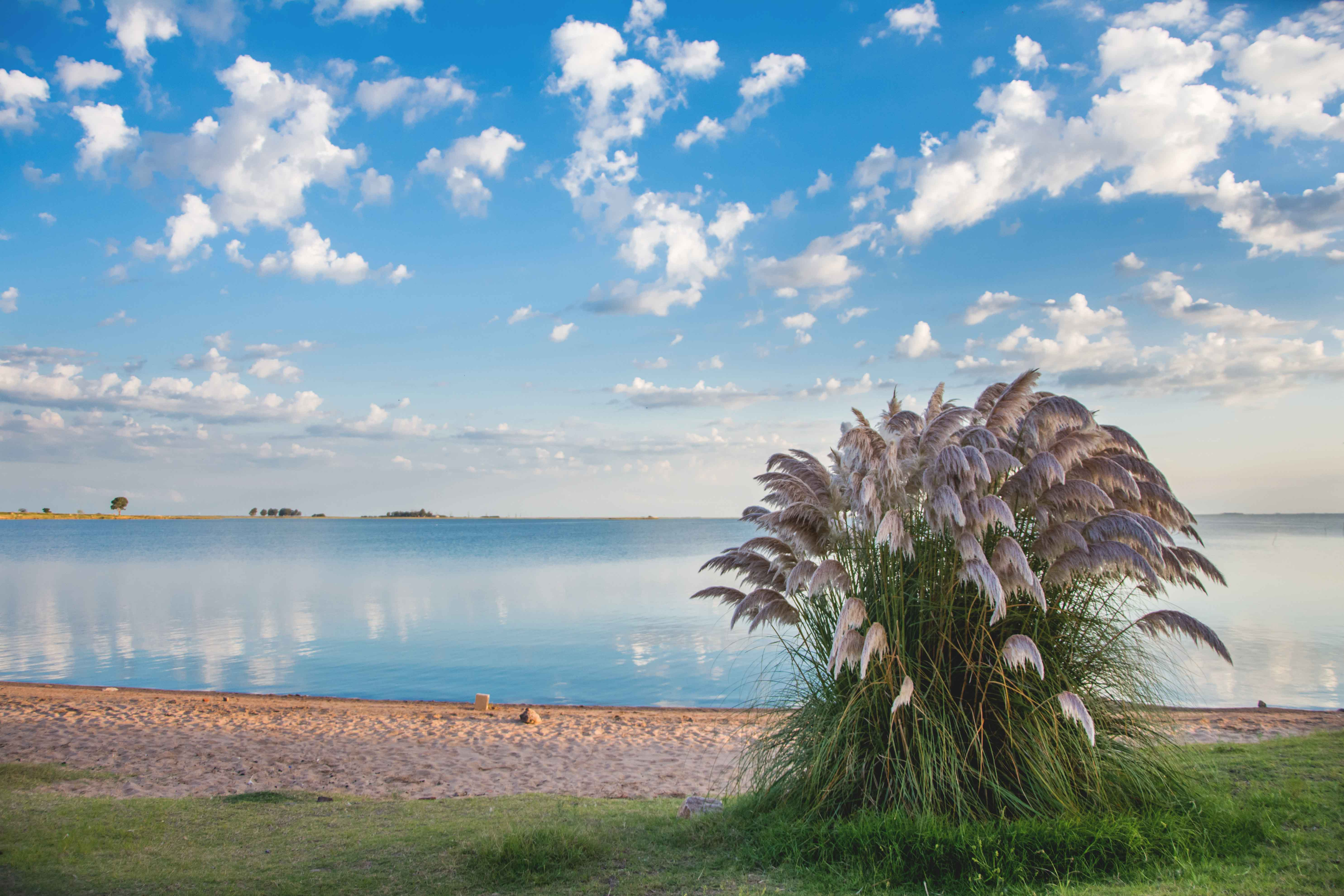 Vista de la Laguna Hinojo Grande